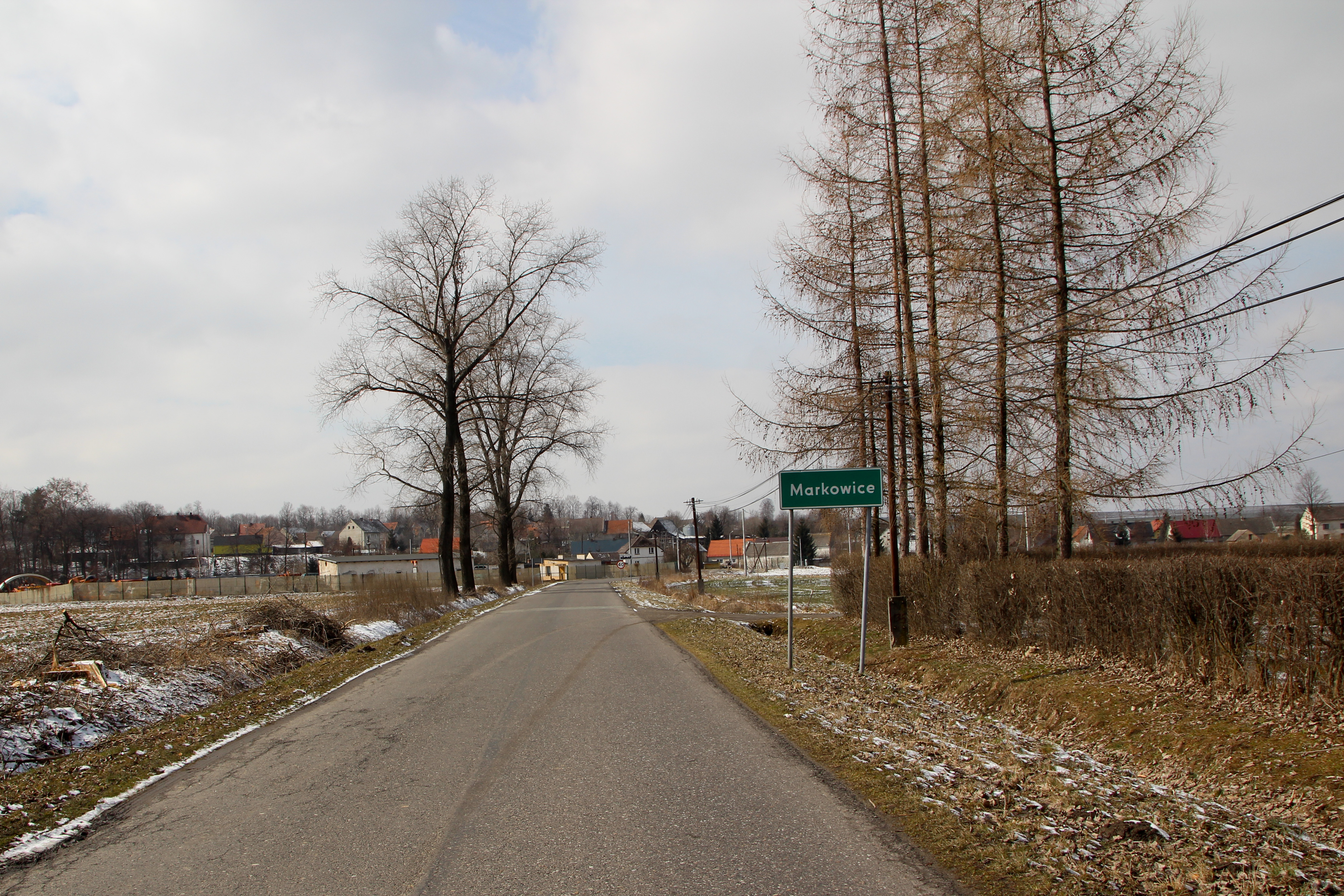 Markowice – wieś w Polsce, w województwie opolskim, w powiecie nyskim, w gminie Głuchołazy.